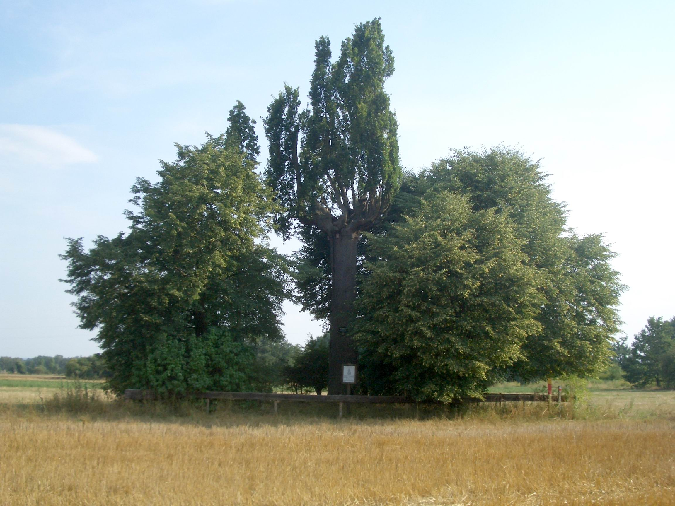 Quercus robur fasticiata in Harreshausen, Germany